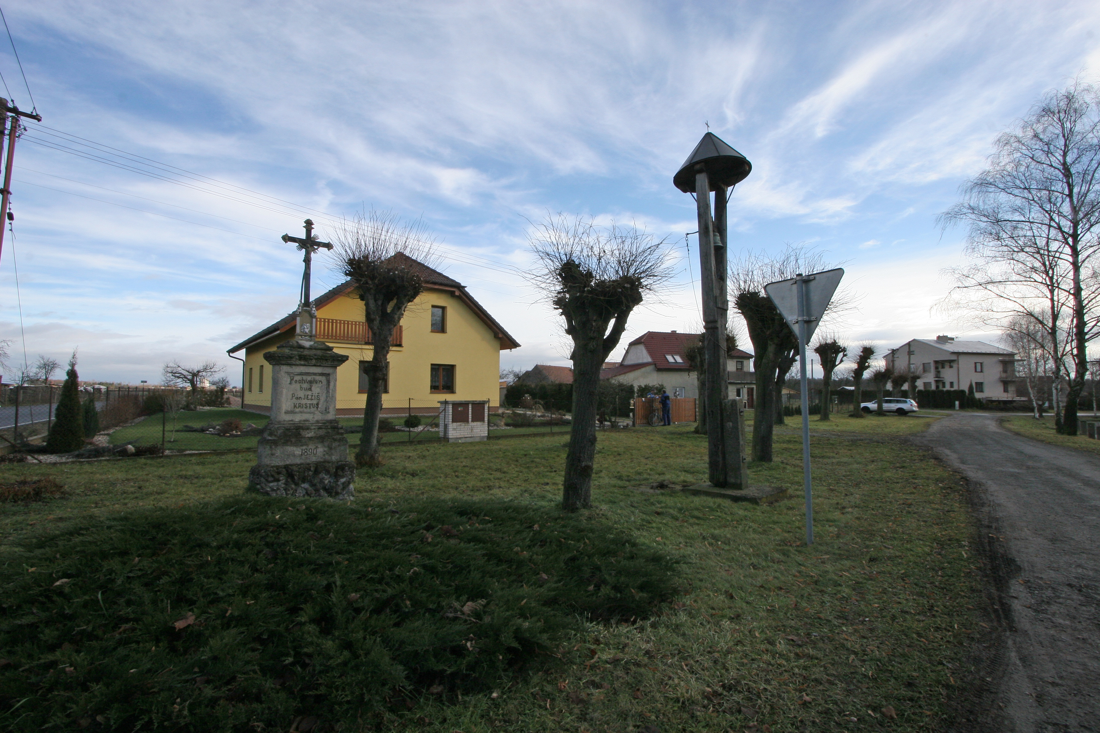 Habřinka křížek a zvonička